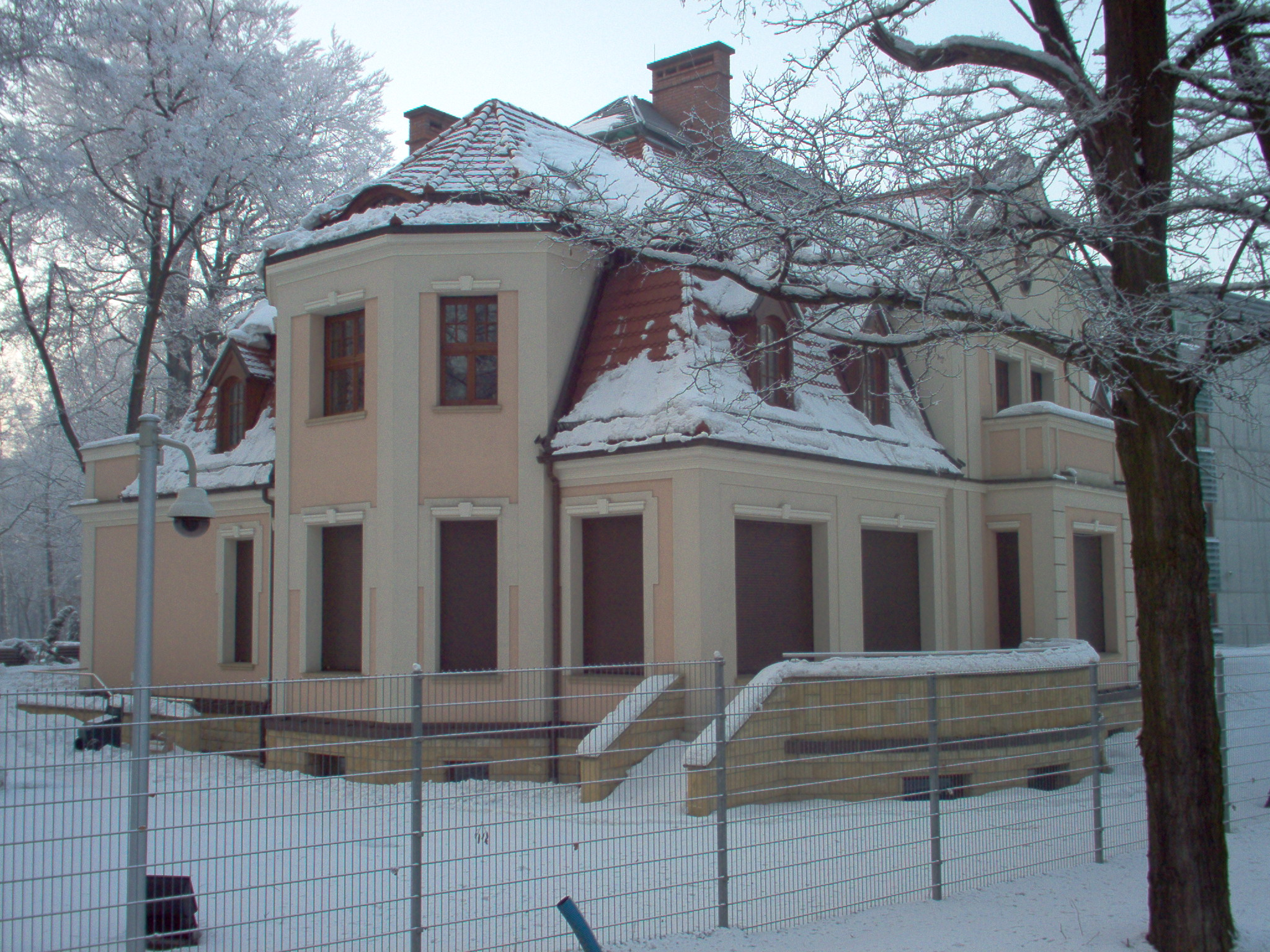 Katowice Giszowiec - willa Uthemanna (dyrektora) z 1910 roku.Zdjęcie mojego autorstwa. (zabytek nr rejestr. A/1628/96)